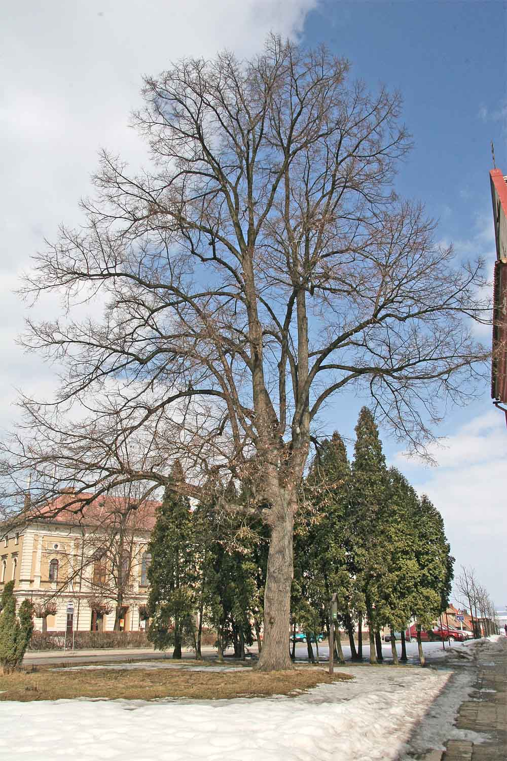 památná lípa malolistá na Kupkově náměstí před kostelem v Opočně